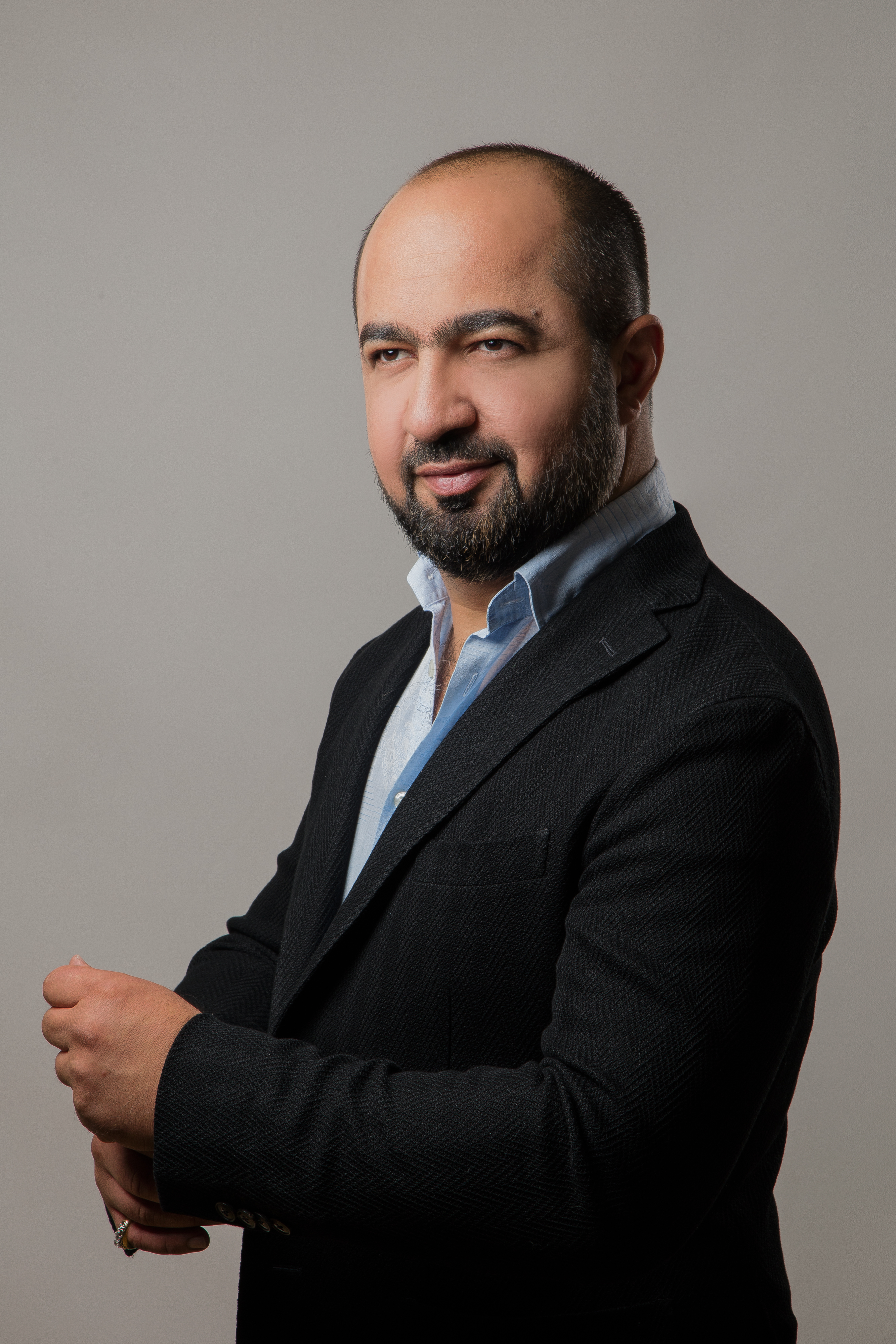 Gevorg Hakobyan Armenian opera singer, baritone